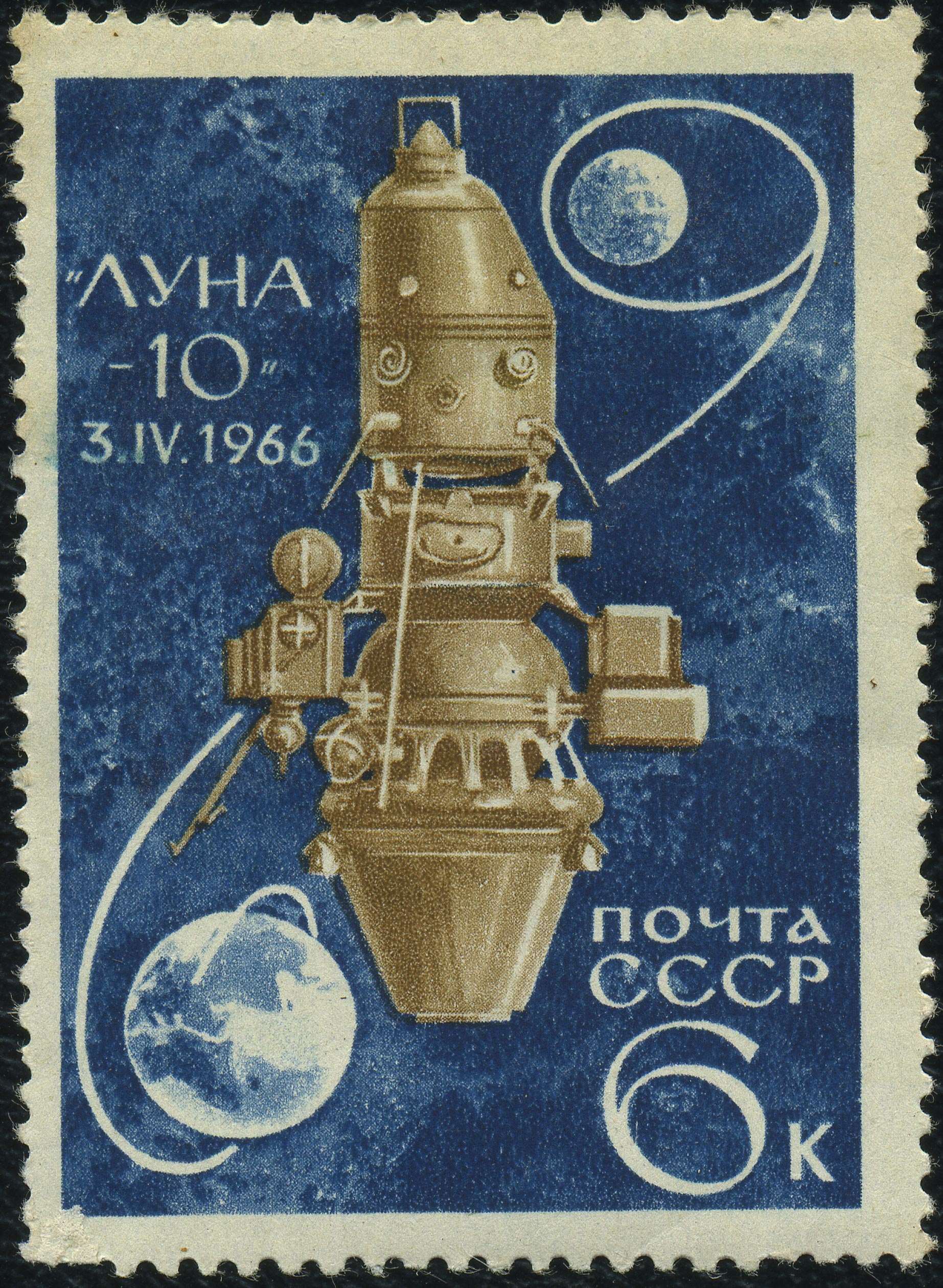 Почтовая марка СССР. 1966. Первый искусственный спутник Луны Луна-10, Земля, Луна, траектория полёта станции. Художники — Лесегри. Тираж — 4 млн.